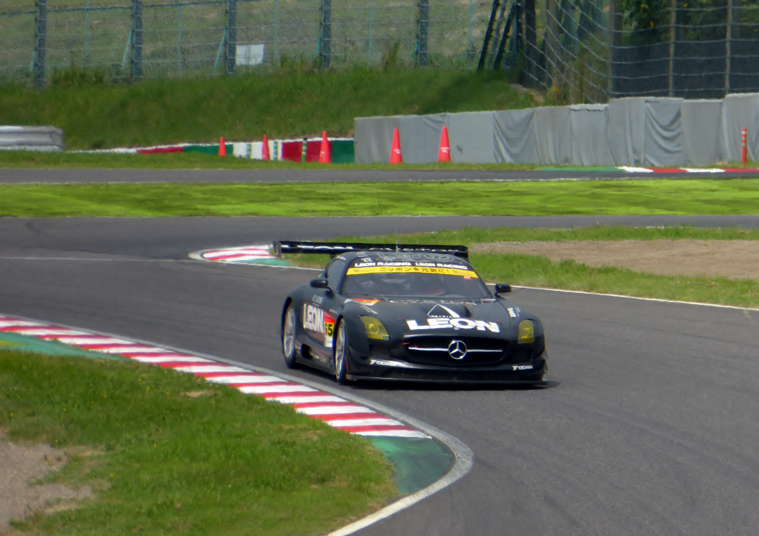 2015年度鈴鹿タイヤテストにおいて65号車LEON SLSを撮影。